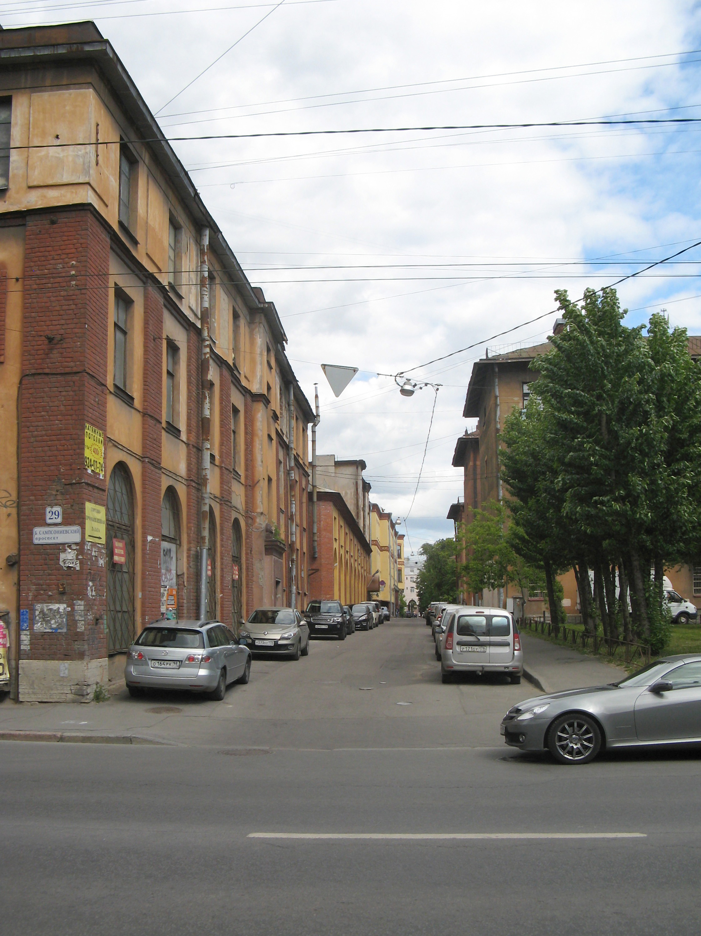 Жилой городок для служащих завода Л. Нобеля: проспект Большой Сампсониевский, 27, Лесной проспект, корпуса 1-7, 9-14, Выборгский район, Санкт-Петербург